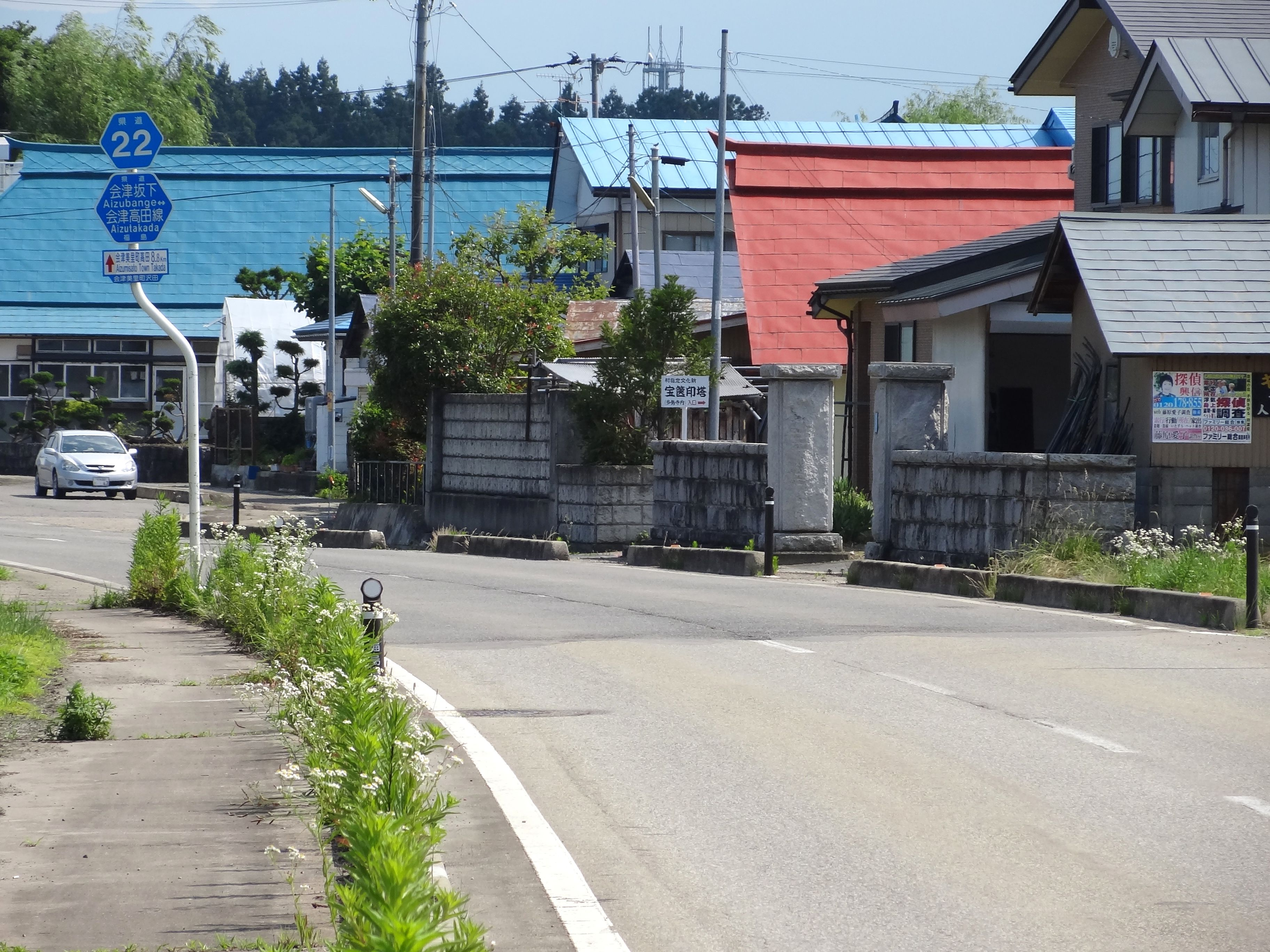 福島県道22号 会津美里町和田目付近